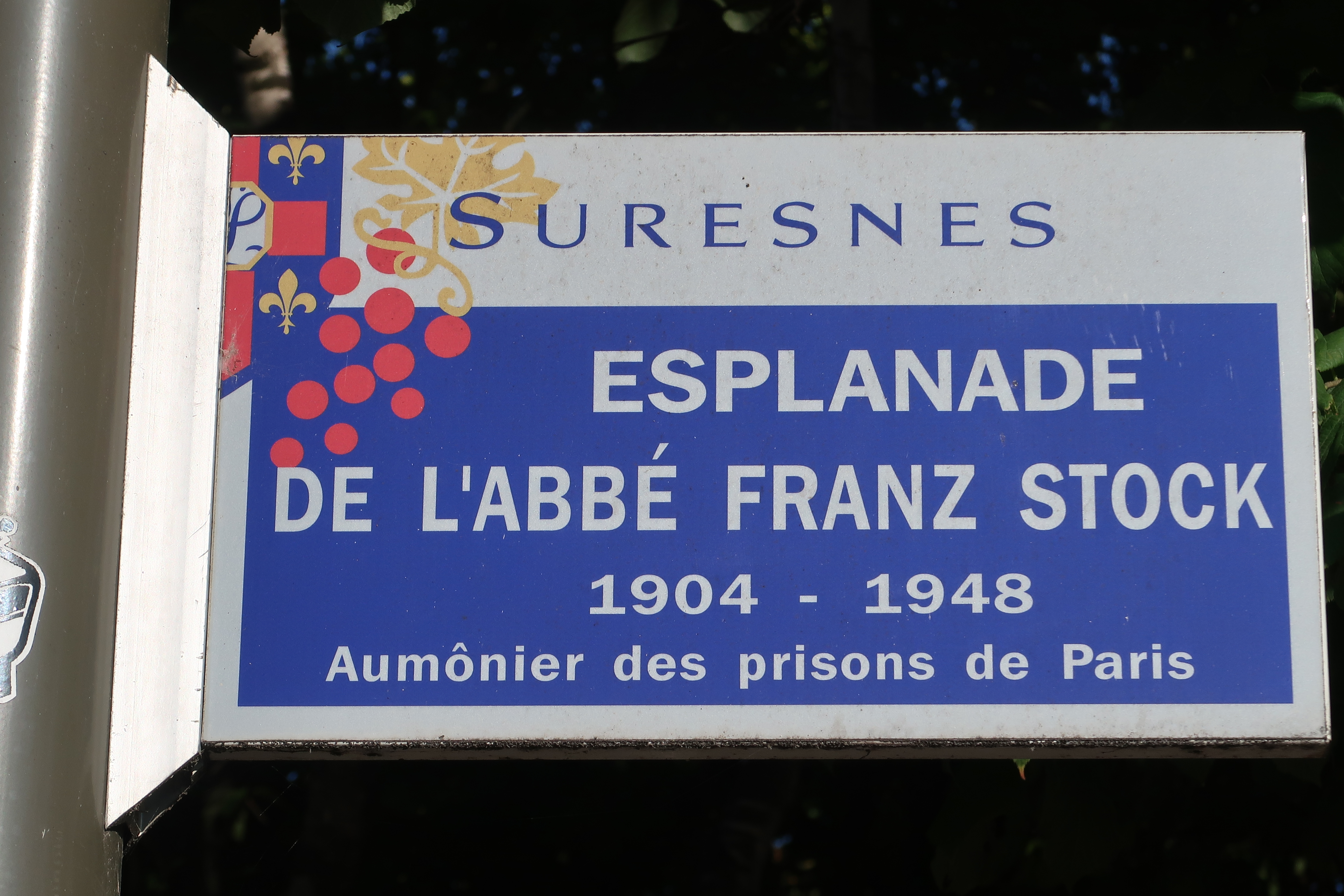 Plaque de l'esplanade de l'abbé-Franz-Stock à Suresnes (Hauts-de-Seine).